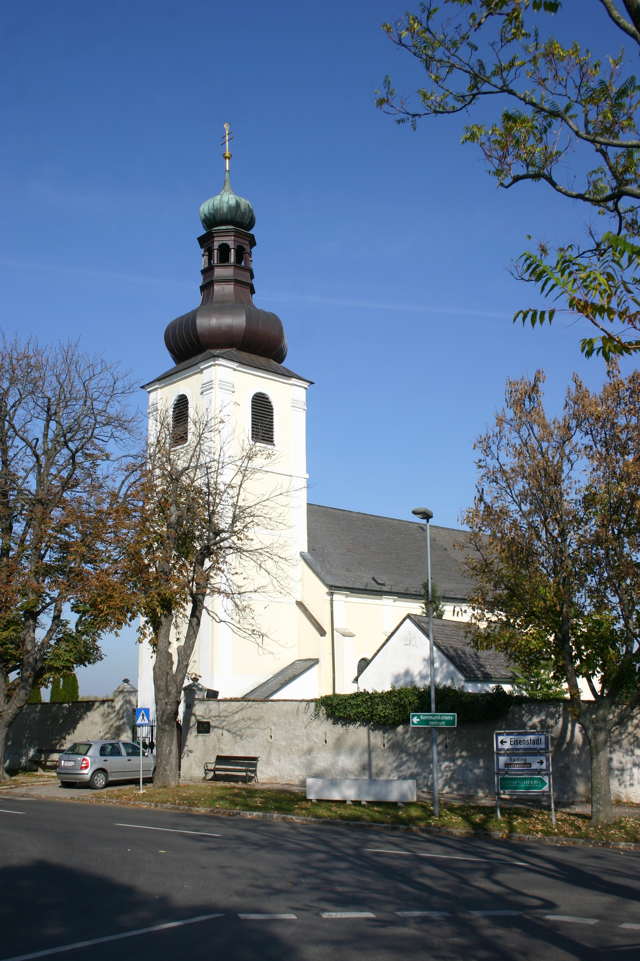 Unterfrauenhaid – Pfarr- und Wallfahrtskirche